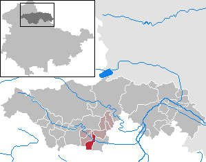 Clingen in Thuringia - Kyffhäuserkreis